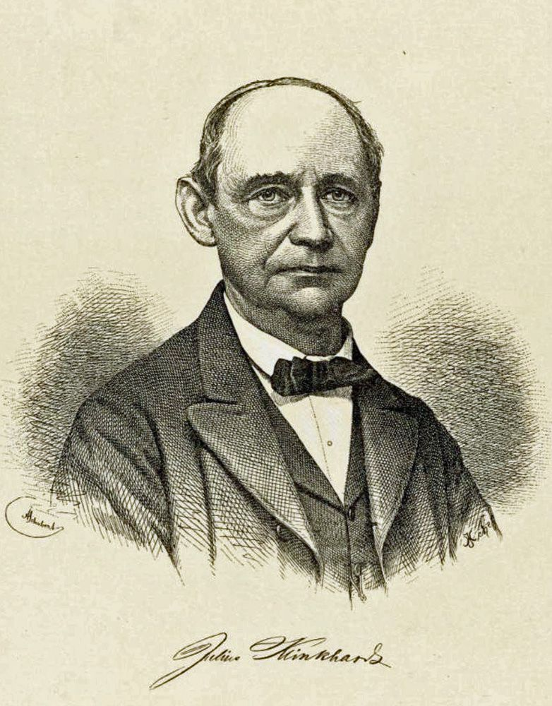 Porträt Julius Klinkhardt, Buchhändler und Verleger in Leipzig